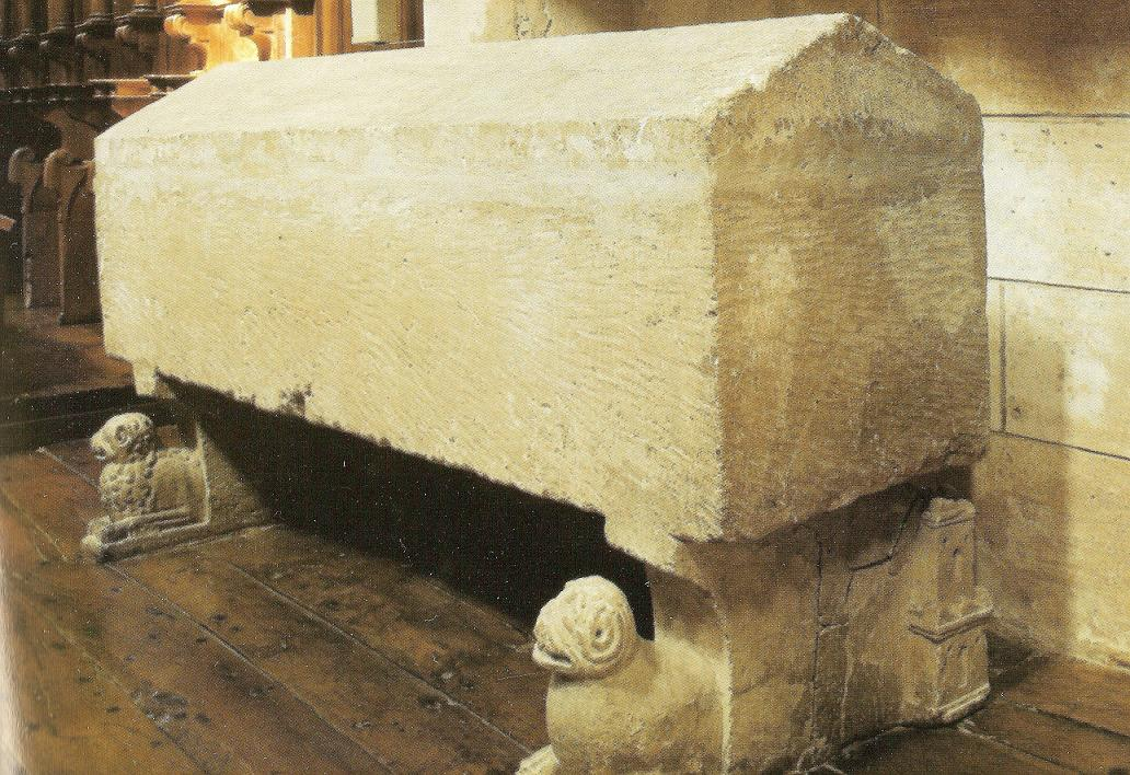 Sepulcro de la reina Berenguela de Castilla, hija de Alfonso VIII de Castilla, esposa de Alfonso IX de León, y madre de Fernando III el Santo. (Monasterio de las Huelgas de Burgos).